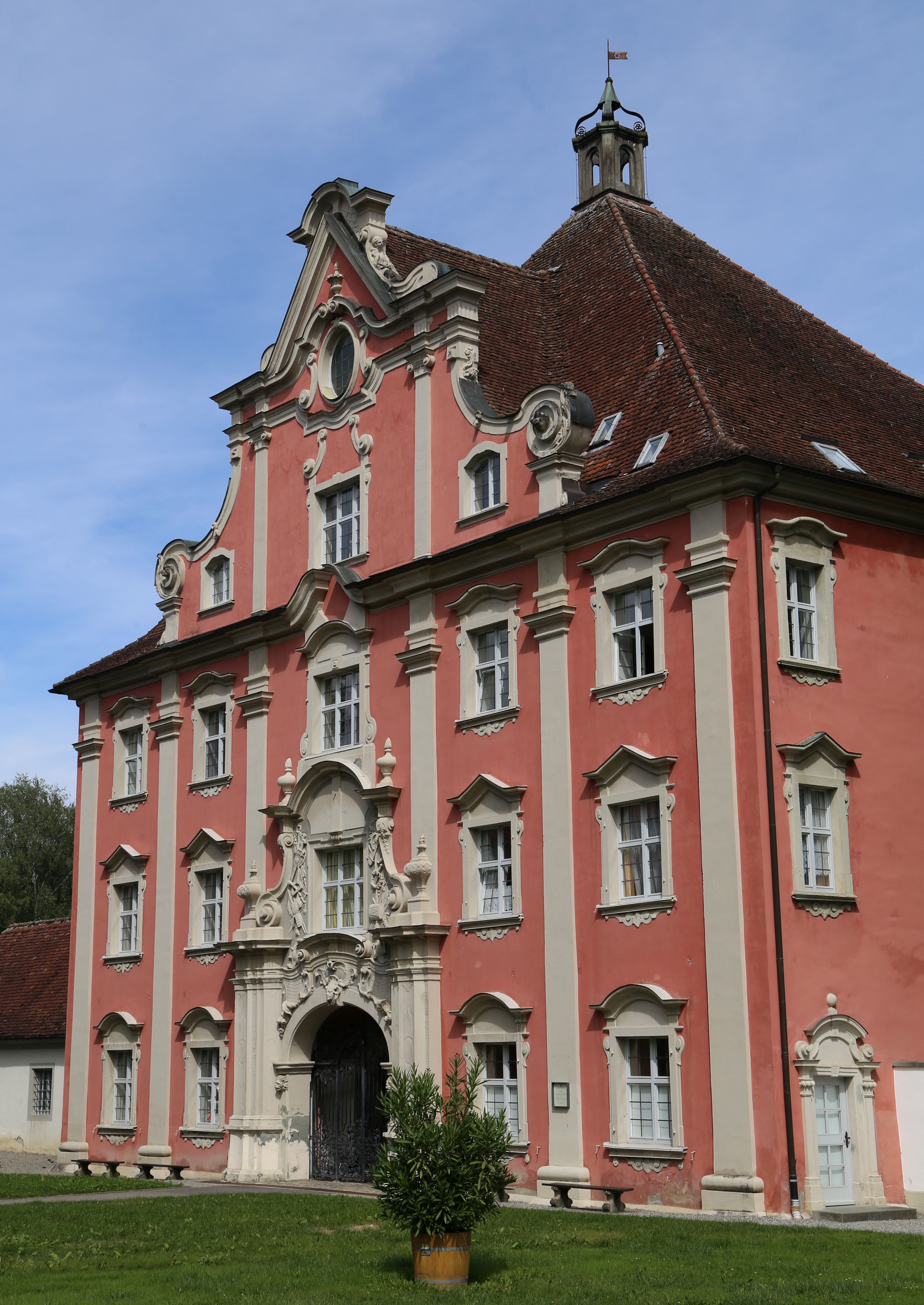 Reichsabtei Salem